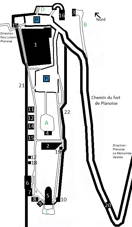 Plan général du môle défensif de Planoise, à Besançon (Doubs, France). Fait sur Paint à partir de l'ouvrage Besançon, ville fortifiée : De Vauban à Séré de Rivières, page 159, et d'un plan de la ville de Besançon sur une plaque accolée au monument.